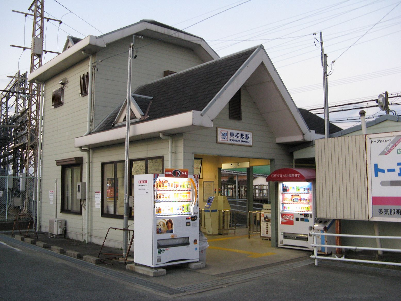 Higashi-Matsusaka Station, Matsusaka, Mie, Japan